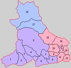 山梨県北都留郡の町村。